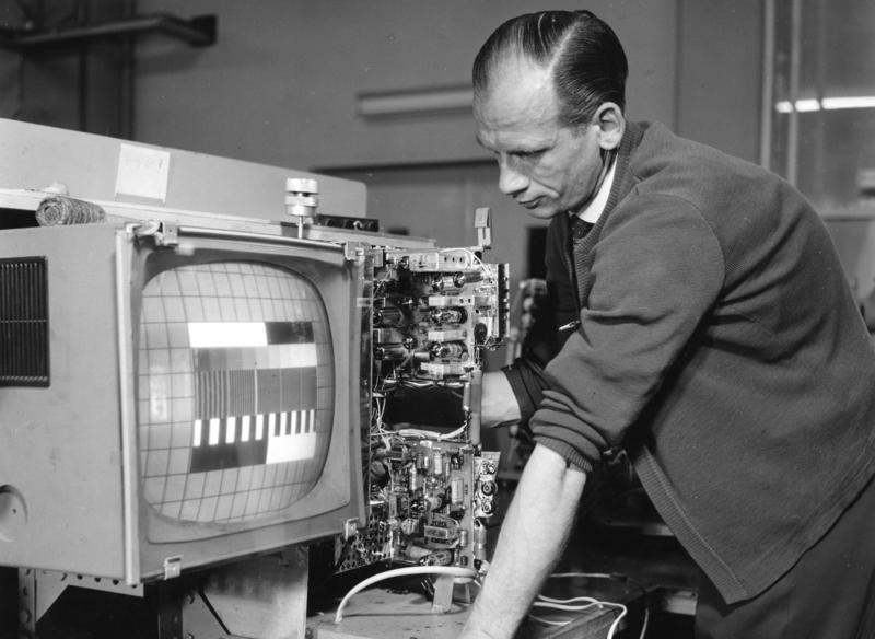 Nürnberg Grundig Radio-Werke Genaue Prüfung des soeben hergestellten Fernseh-Chassis auf seine Bildqualität. Ein Testbild läßt jeden Fehler oder jede Bildverzeichnung erkennen.